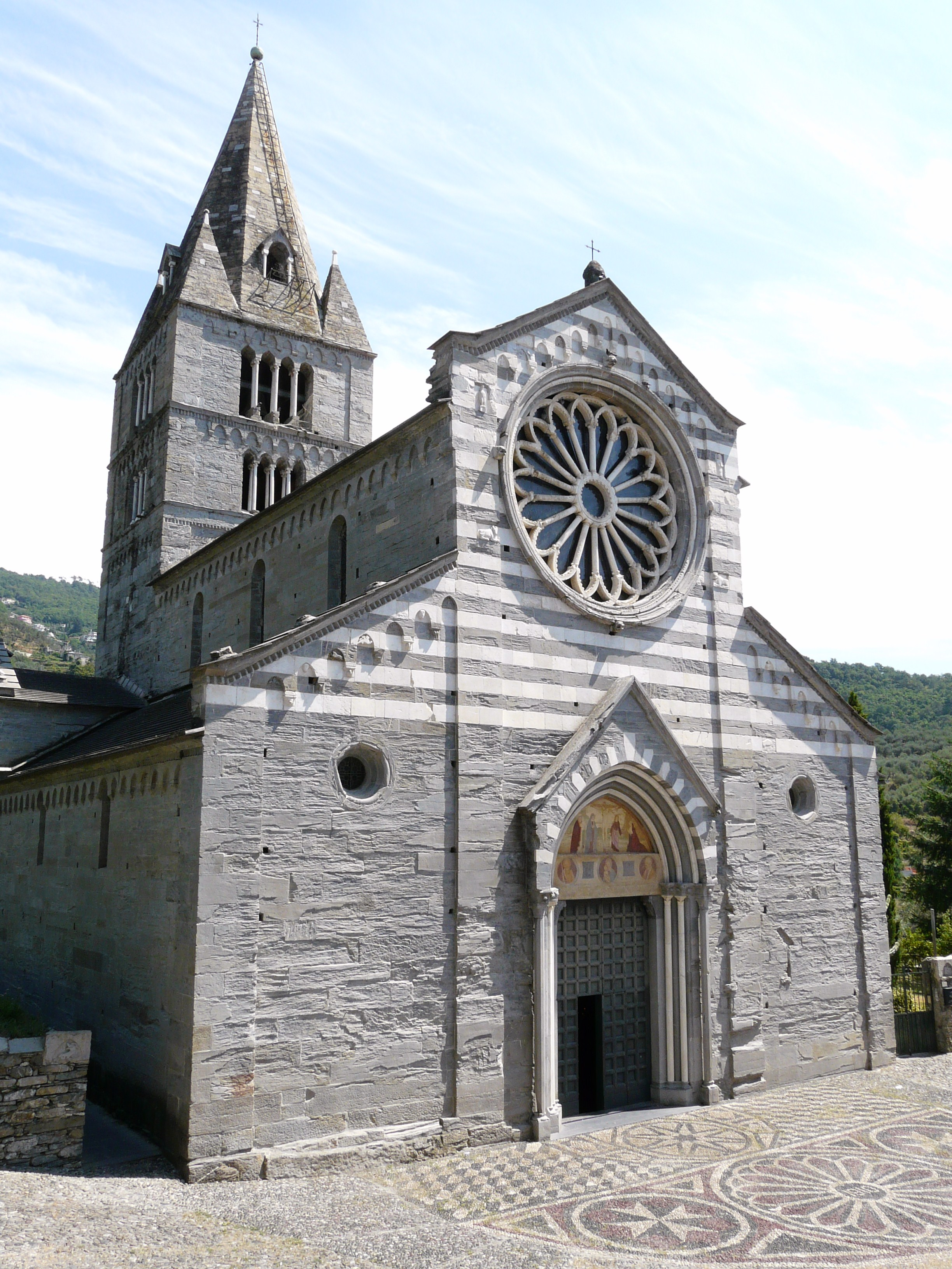 Interni ed esterni della basilica dei Fieschi presso il borgo di San Salvatore di Cogorno, Liguria, Italia Basilica dei Fieschi presso il borgo di San Salvatore di Cogorno, Liguria, Italia